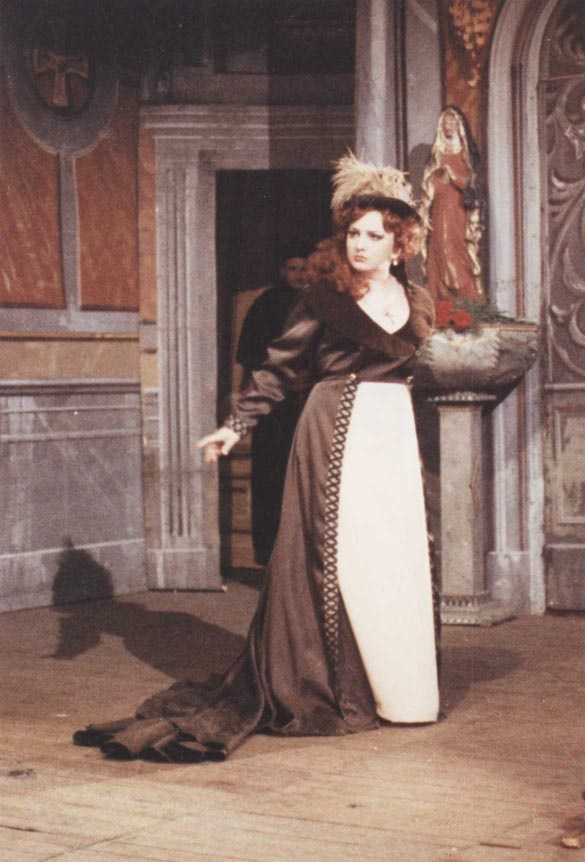 Надя Стефан Савова в Тоска / Nadia Stefan-Savova